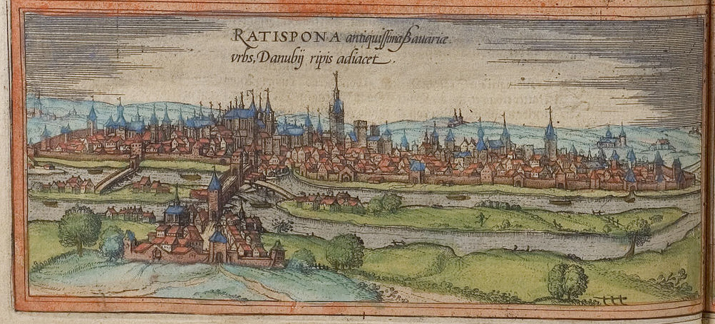 Regensburg